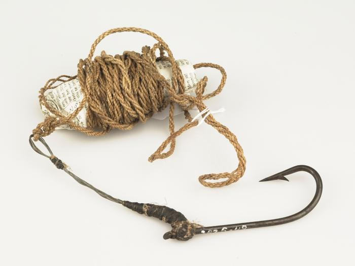 Visgerei. Vislijn van murisi-touw met ijzeren weerhaak